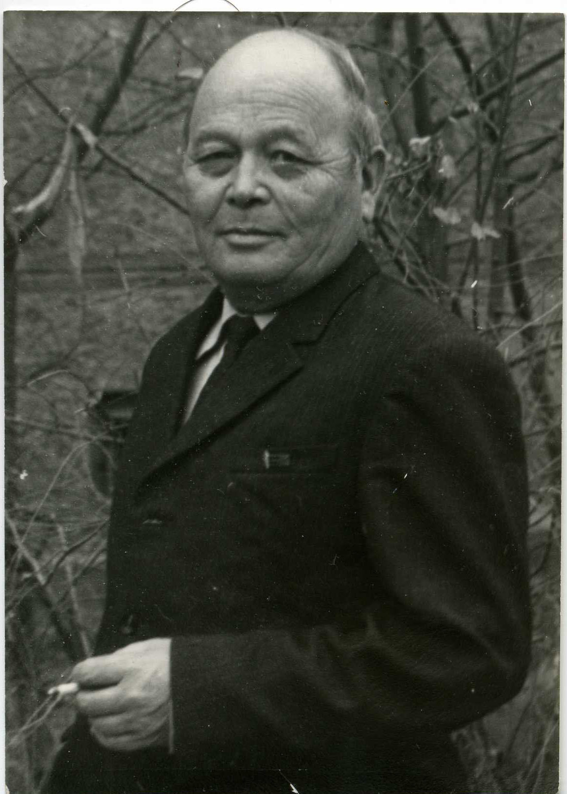 Омаргали Кудышев